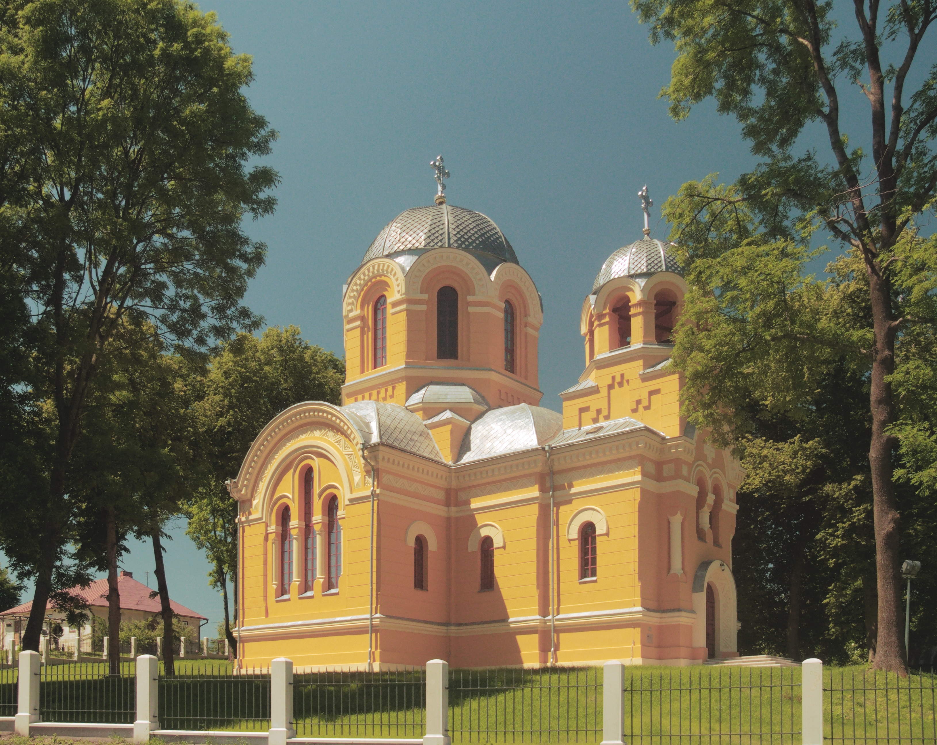 cerkiew pod wezwaniem Szymona Słupnika w Dołhobyczowie po remoncie